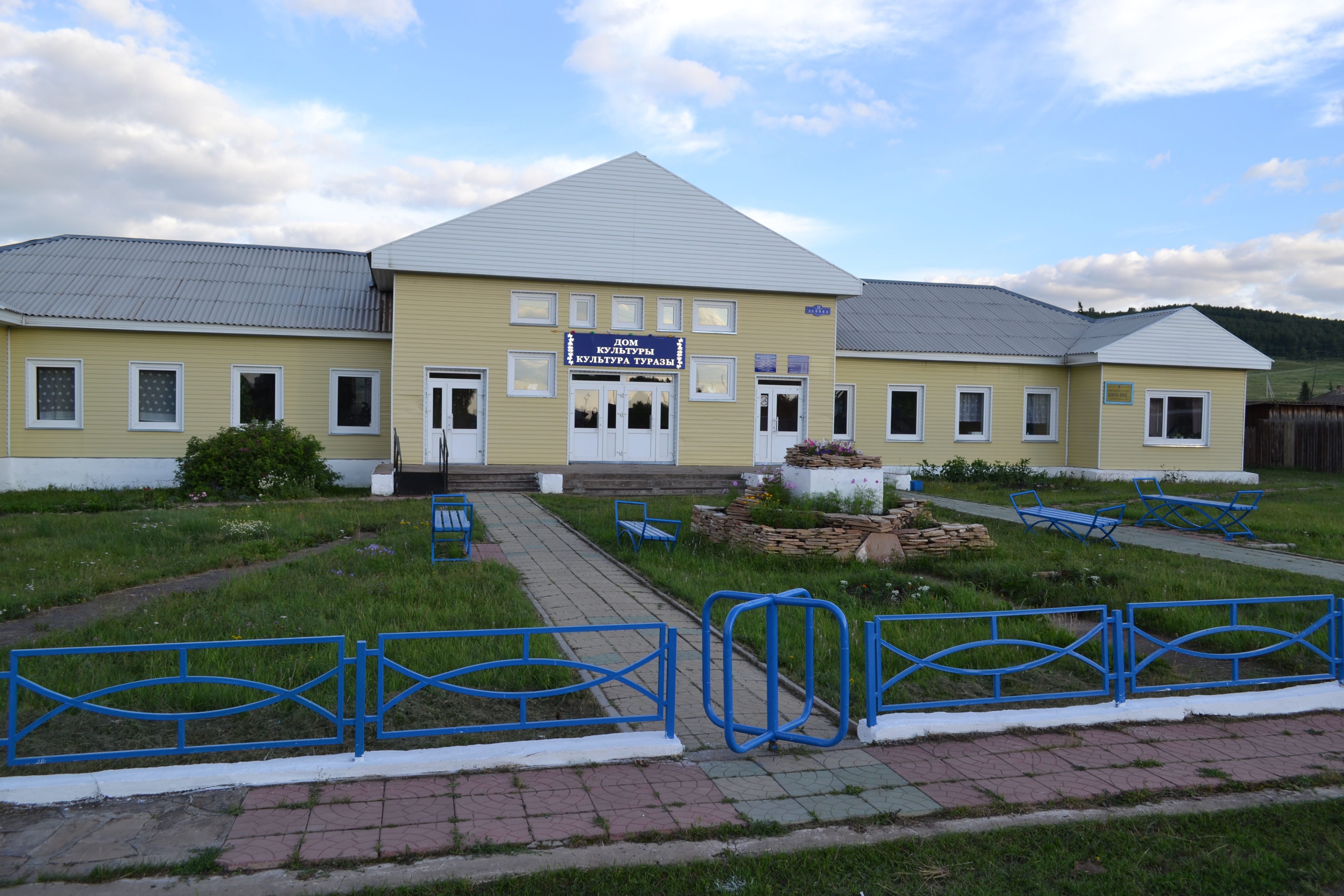 Обновленное здание клуба